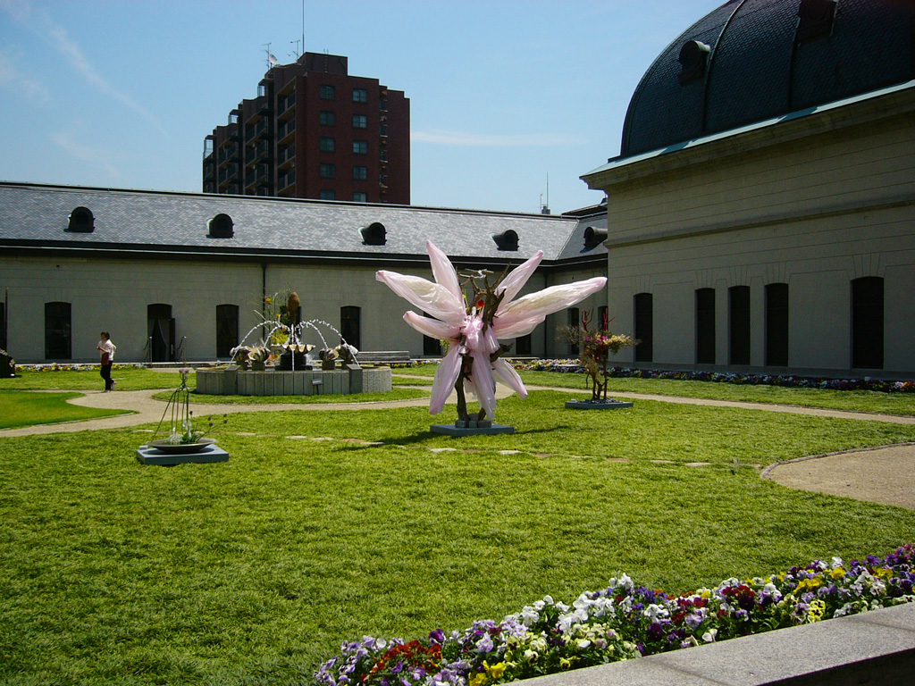 兵庫県公館 屋上庭園